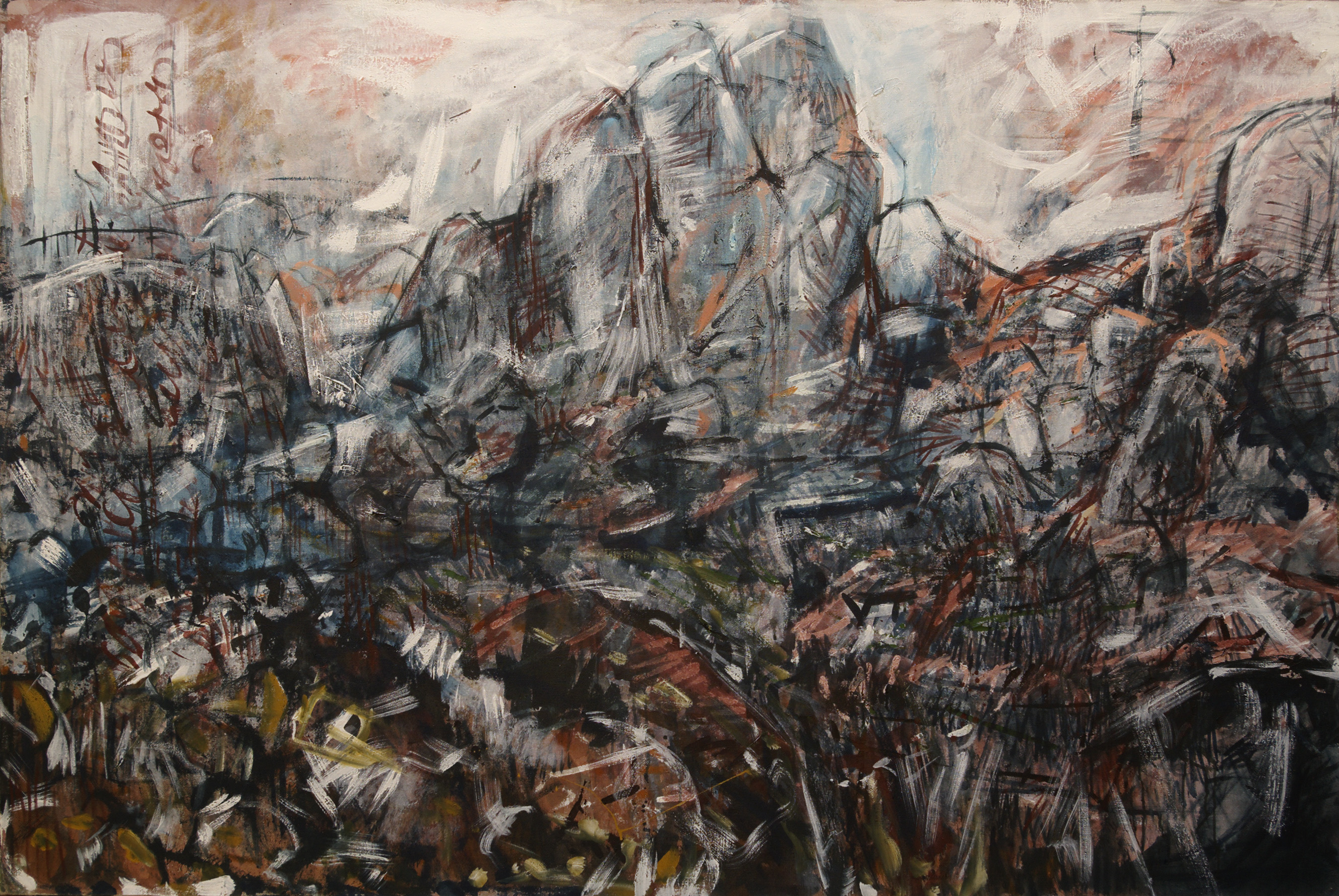 tableau - Dans le Luberon, huile sur toile 130 × 195 cm, 2008